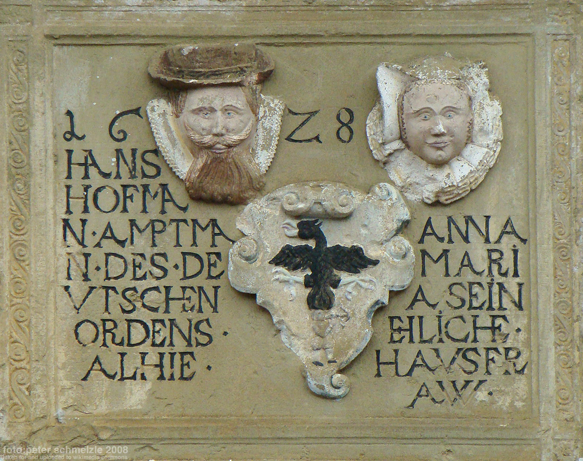 Wappen- und Inschriftenstein am Amtmannshof in Heilbronn-Kirchhausen